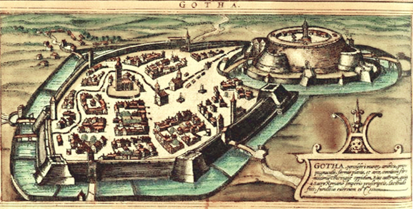 Holzschnitt aus dem Jahr 1572 von der Stadt Gotha